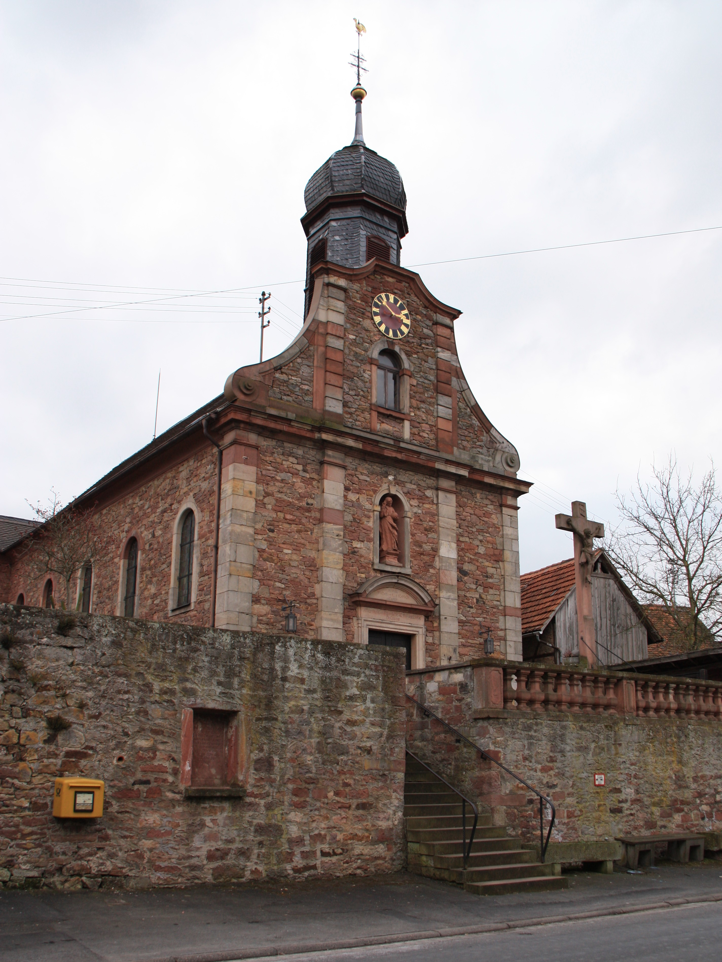 Die Kirche von Schmachtenberg